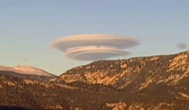 Un núvol lenticular (Autocumulus Lenticularis) al Port del Compte, a finals de novembre del 2015.